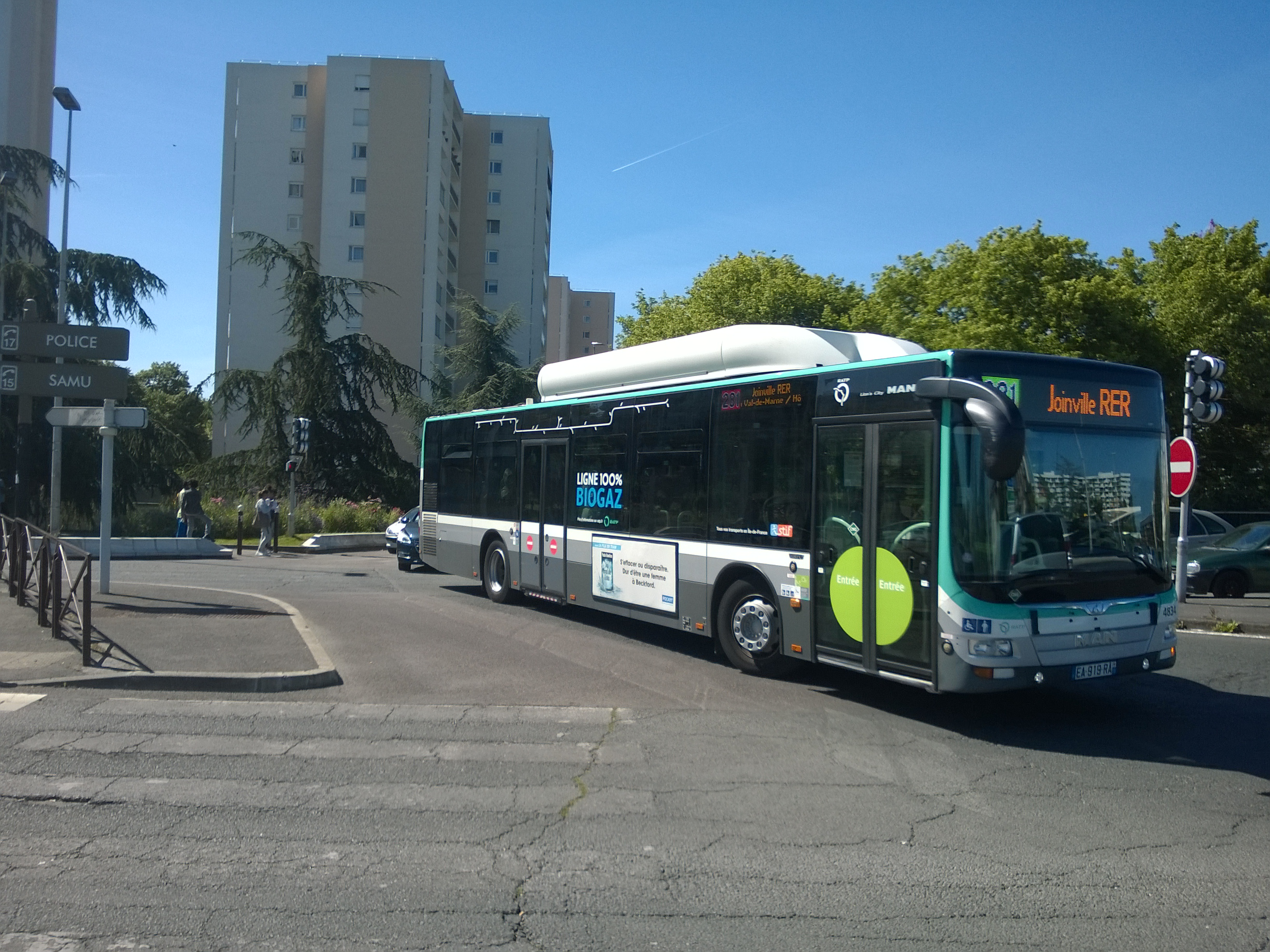 Avenue des Compagnons de la Libération, Créteil (département du Val-de-Marne, France).MAN Lion's City GNV assurant une course de la ligne 281 pour la gare de Joinville-le-Pont.